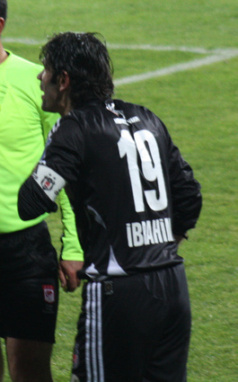 Bünyamin gezer Beşiktaş vs Gençlerbirliği Mücadesi yönetiminde 2010